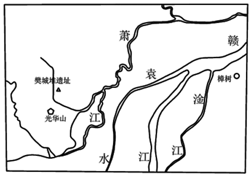 中文（台灣）: 樊城堆遺址位置圖